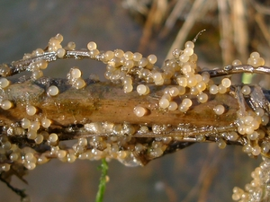 Aspius aspius Rom från fisken Asp. Fotolokal Sävjaån, ett biflöde till Fyrisån.